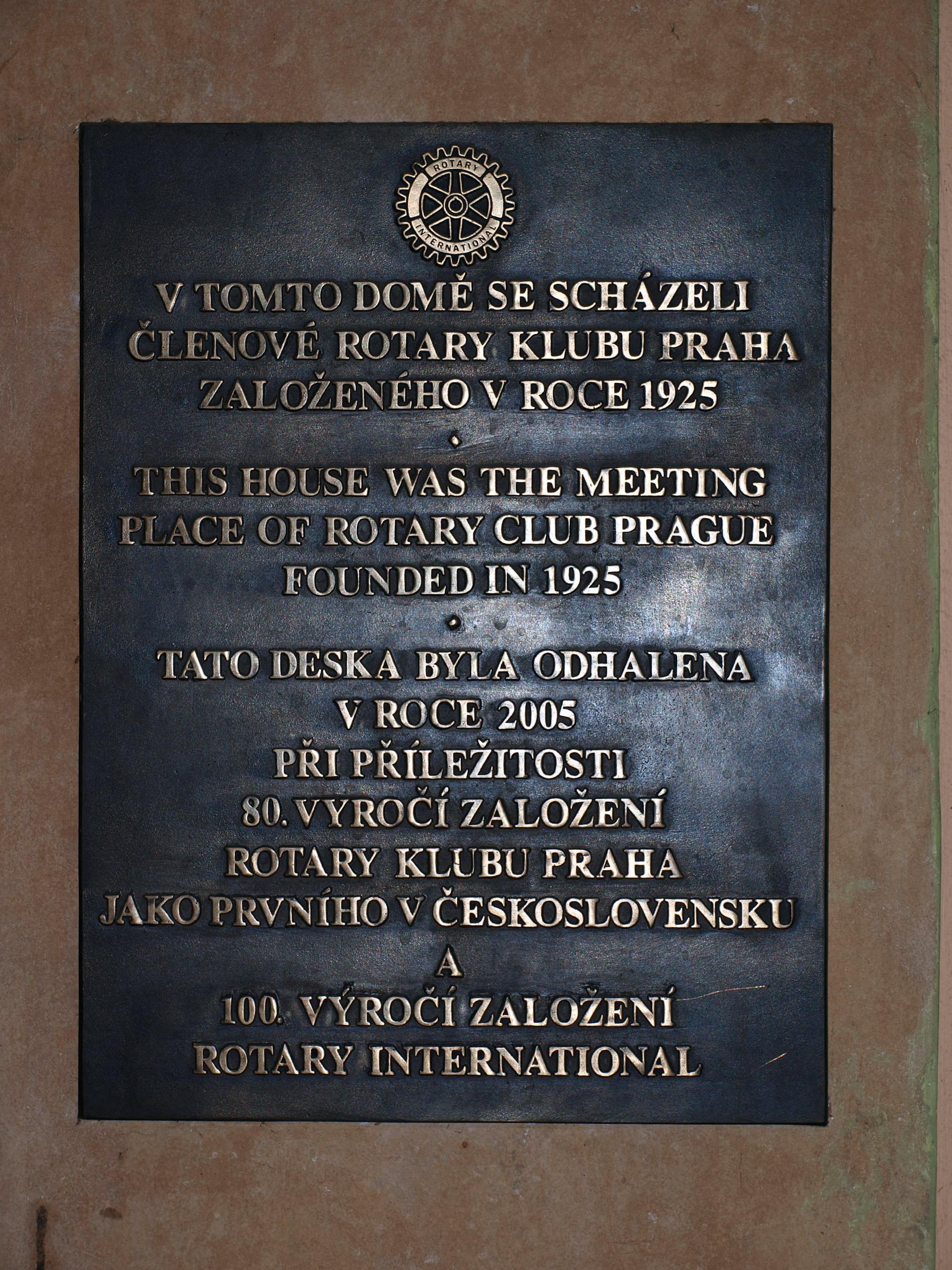 Palác Sylva-Taroucca